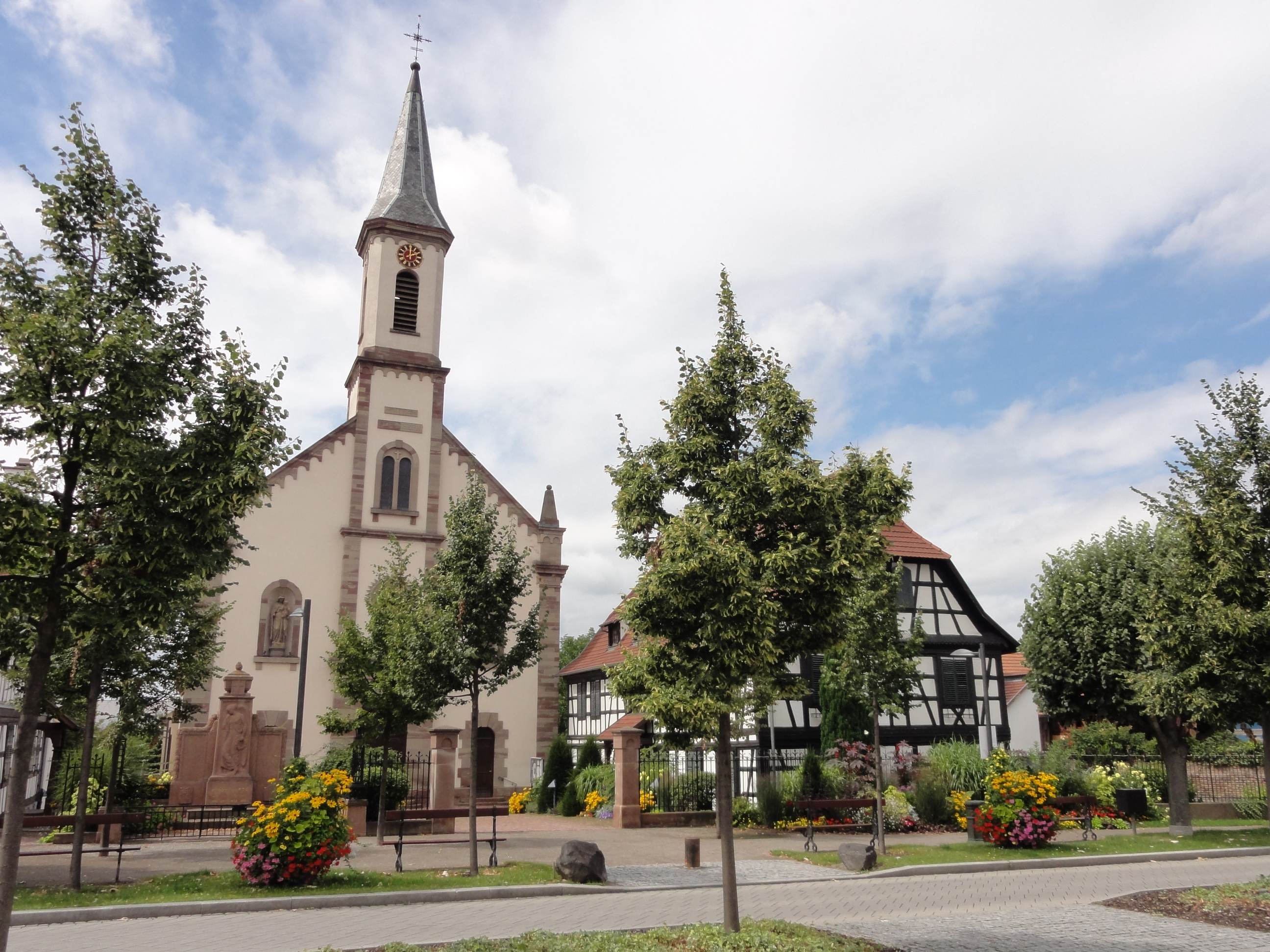 Alsace, Bas-Rhin, Hoenheim, Église Saint-Joseph, Place de la République.